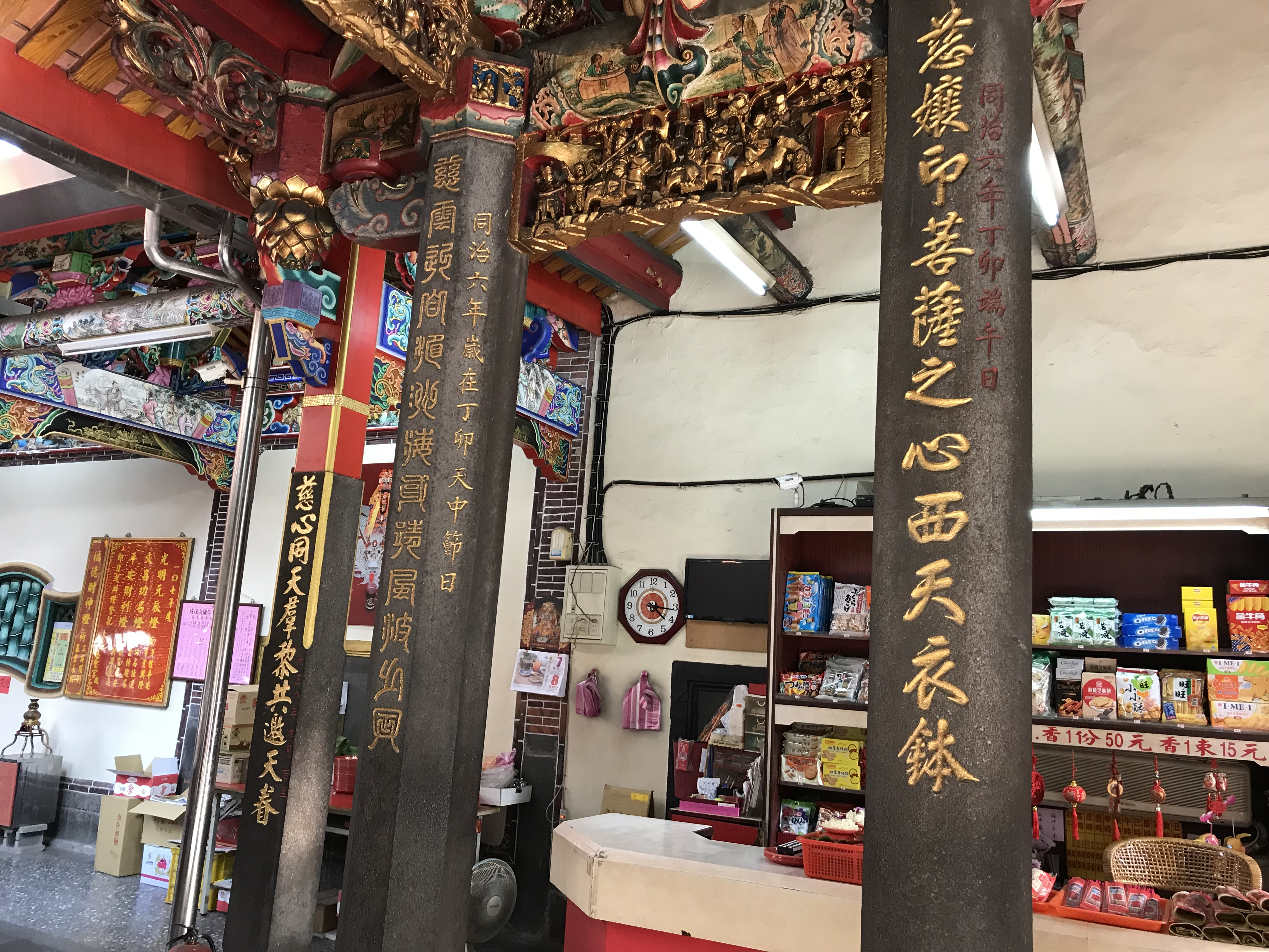 中文（台灣）: 大稻埕慈聖宮同治六年石柱